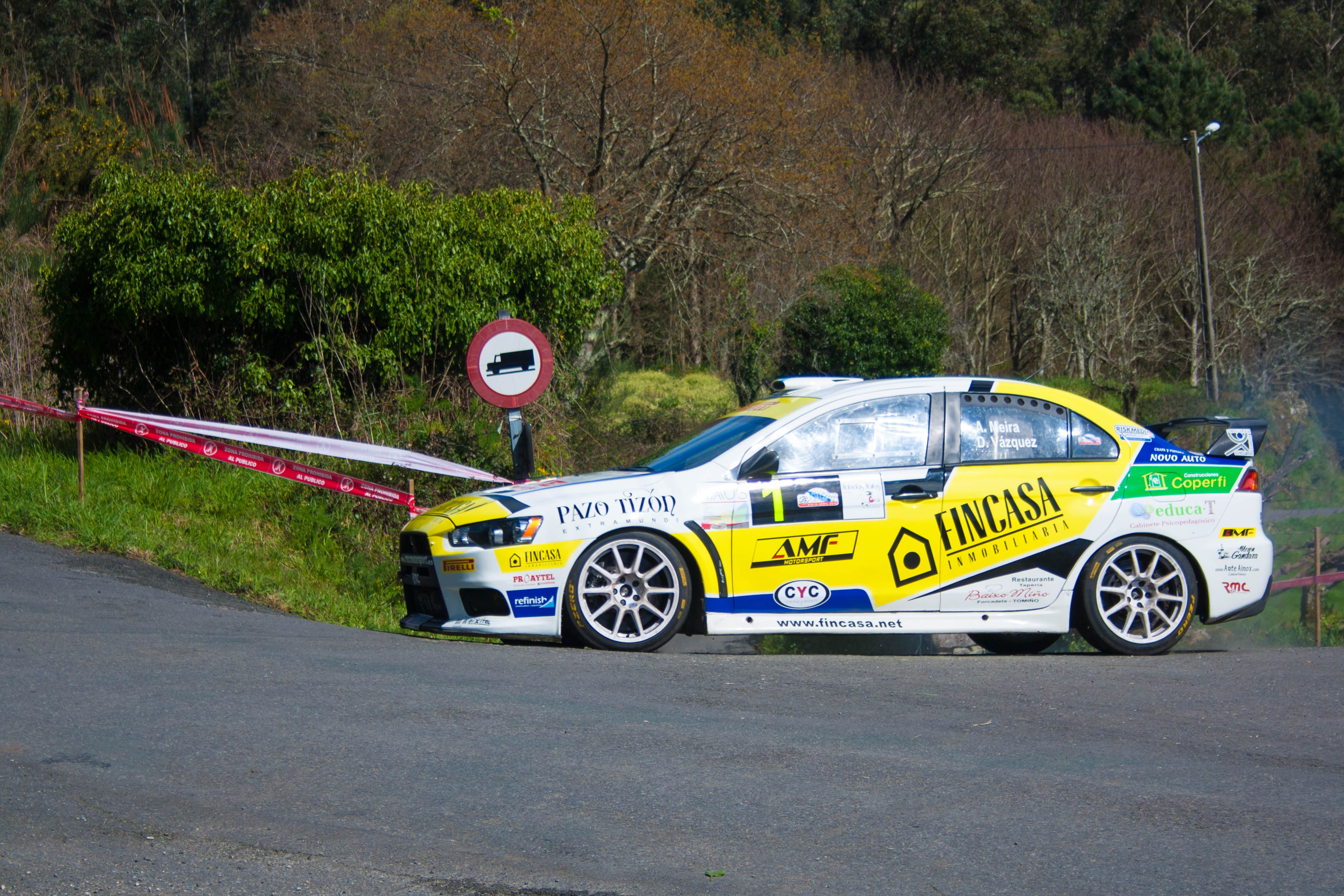 Primera pasada de la tarde por el tramo que transcurre por la aldea de Quintáns